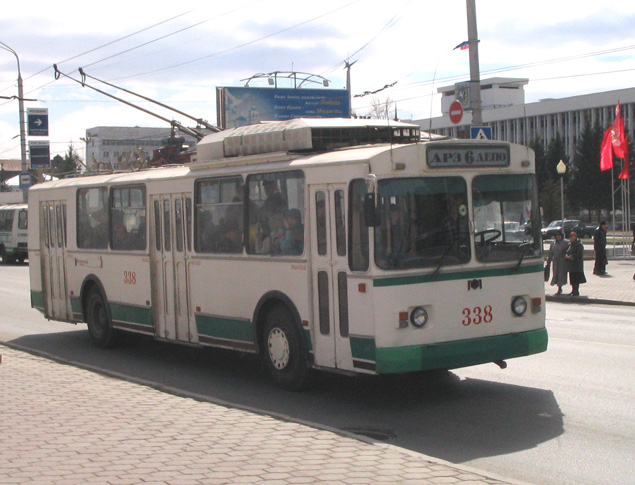 Томский троллейбус № 338. Томск, площадь Ленина.